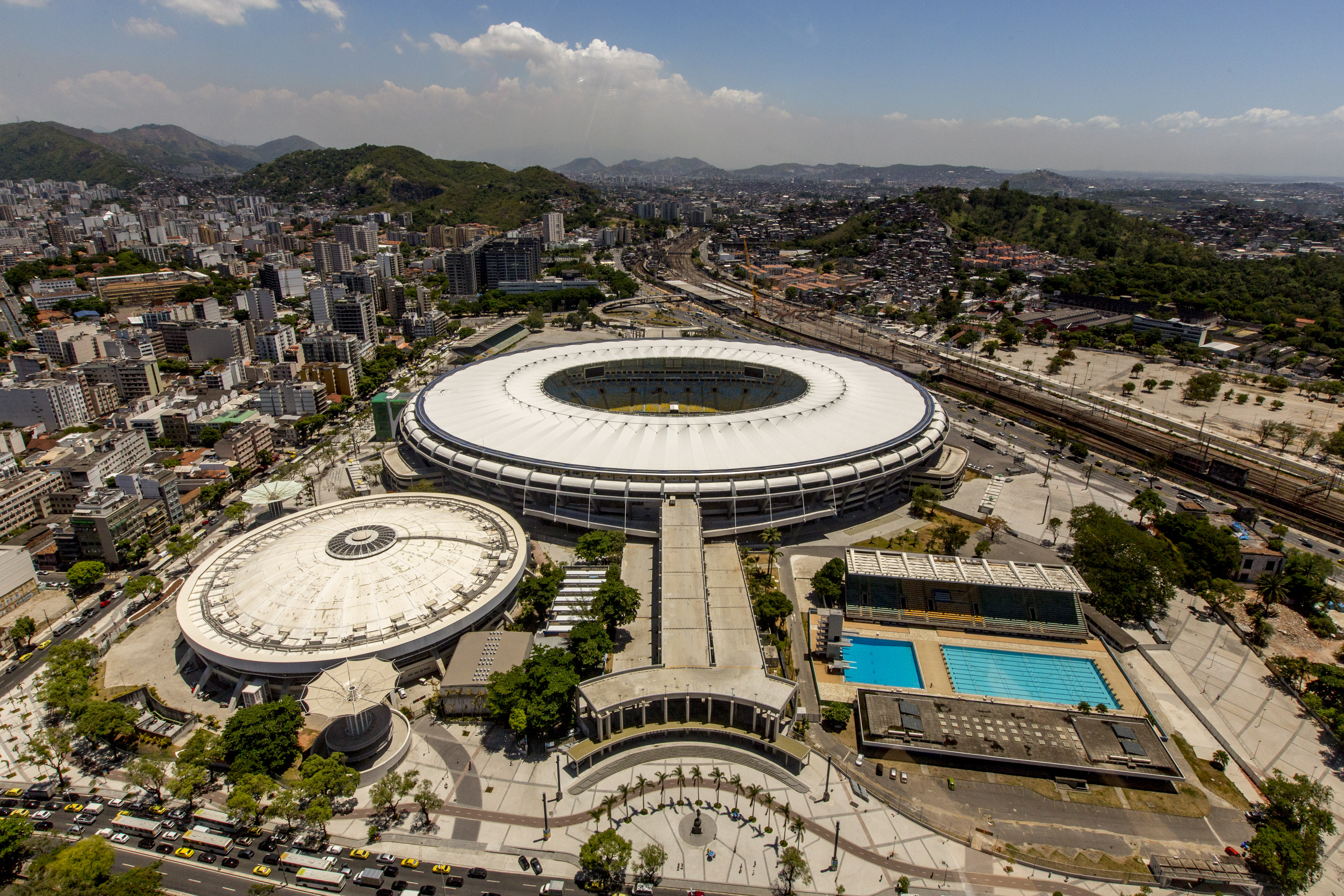 Estádio Jornalista Mário Filho, mais conhecido como Maracanã. Foto de fevereiro de 2014.